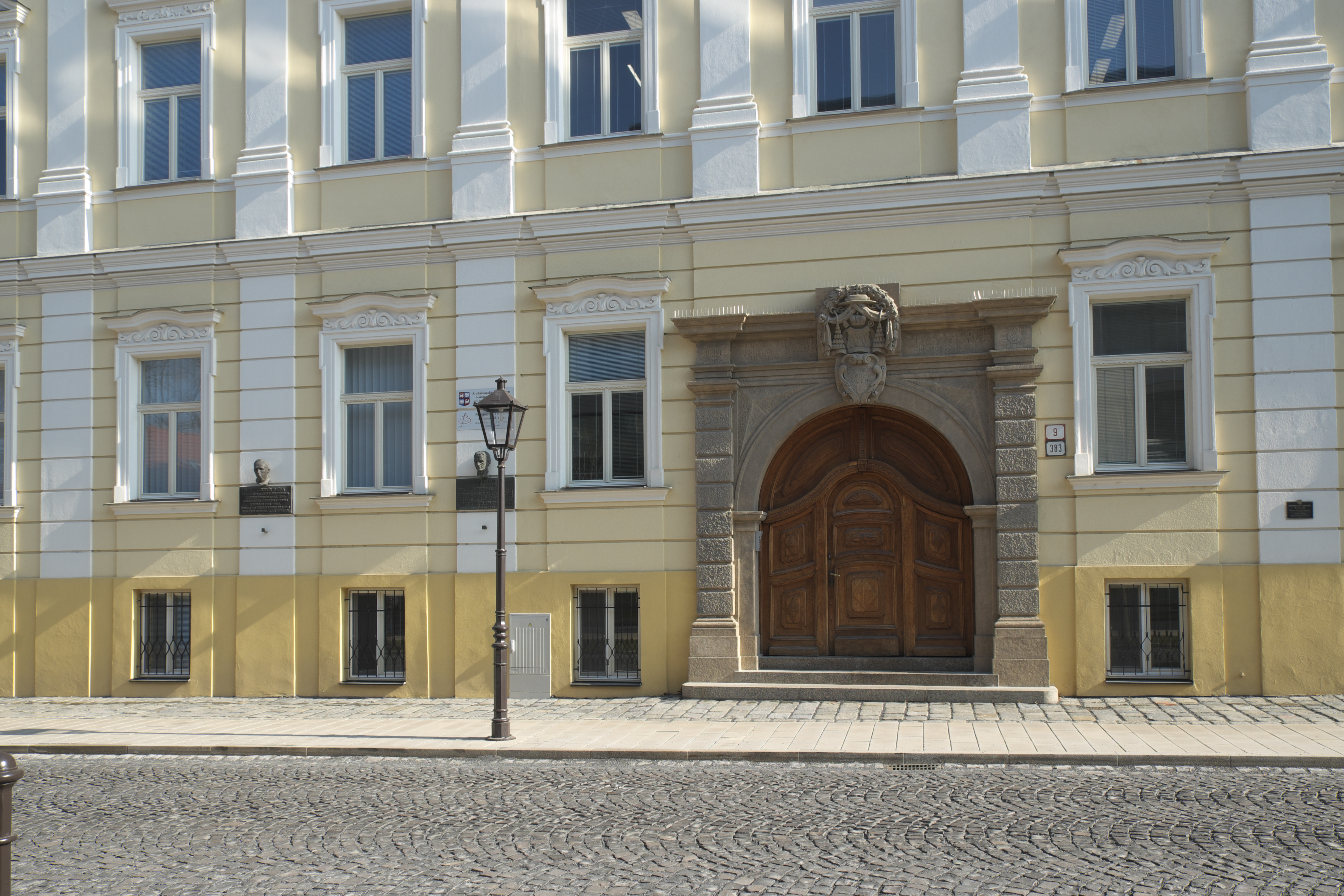 Seminar Rubrorum, Hollého, in Trnava (Slowakei)